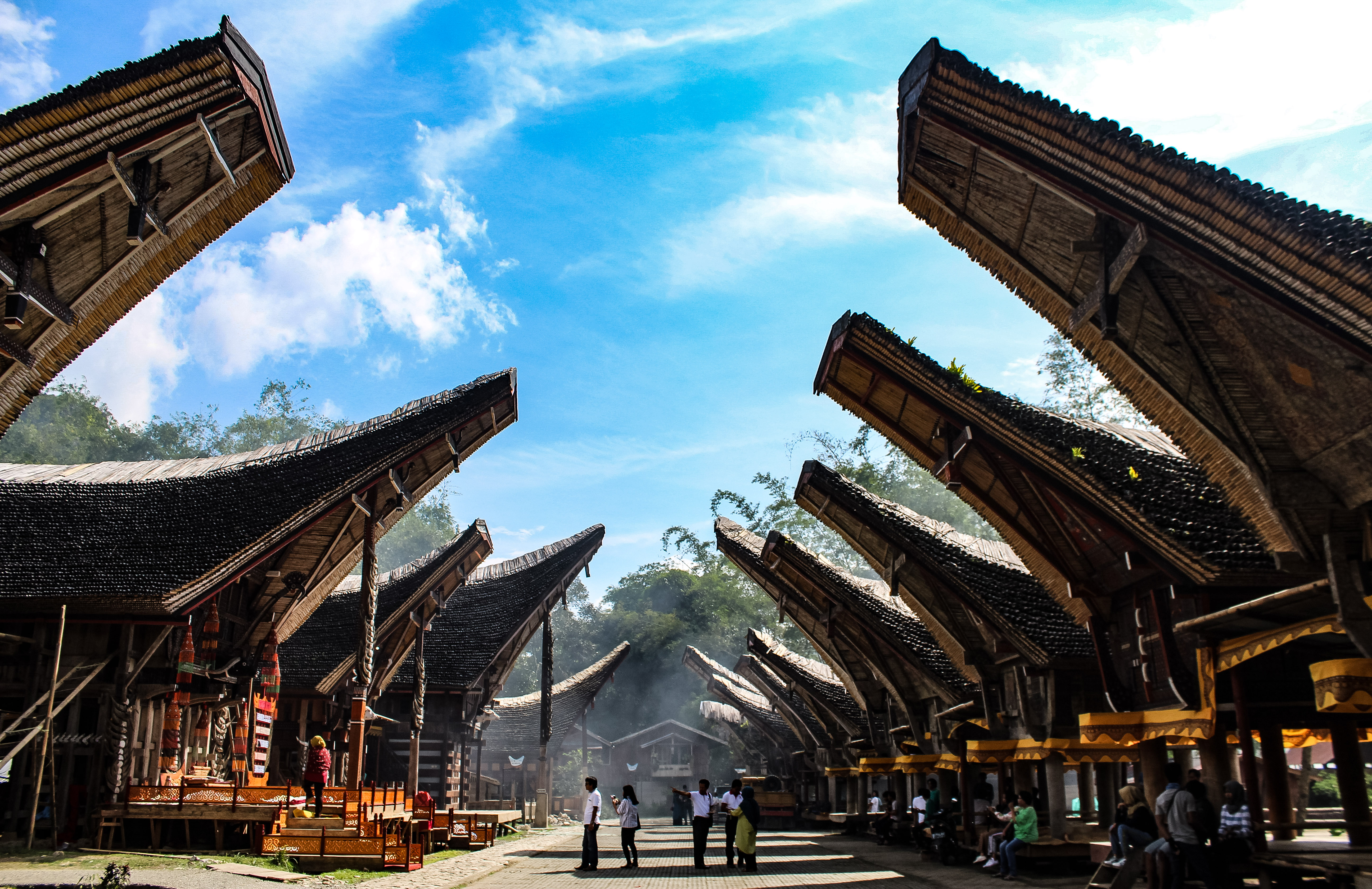 Kete' Kesu' merupakan salah satu objek wisata yang berlokasi di Kabupaten Toraja Utara. Terdapat jejeran Tongkonan yang merupakan rumah adat masyarakat Toraja. Selain itu di komplek yang sama juga terdapat makam yang sudah dijadikan objek wisata, serta banyak penjual oleh-oleh khas Toraja.